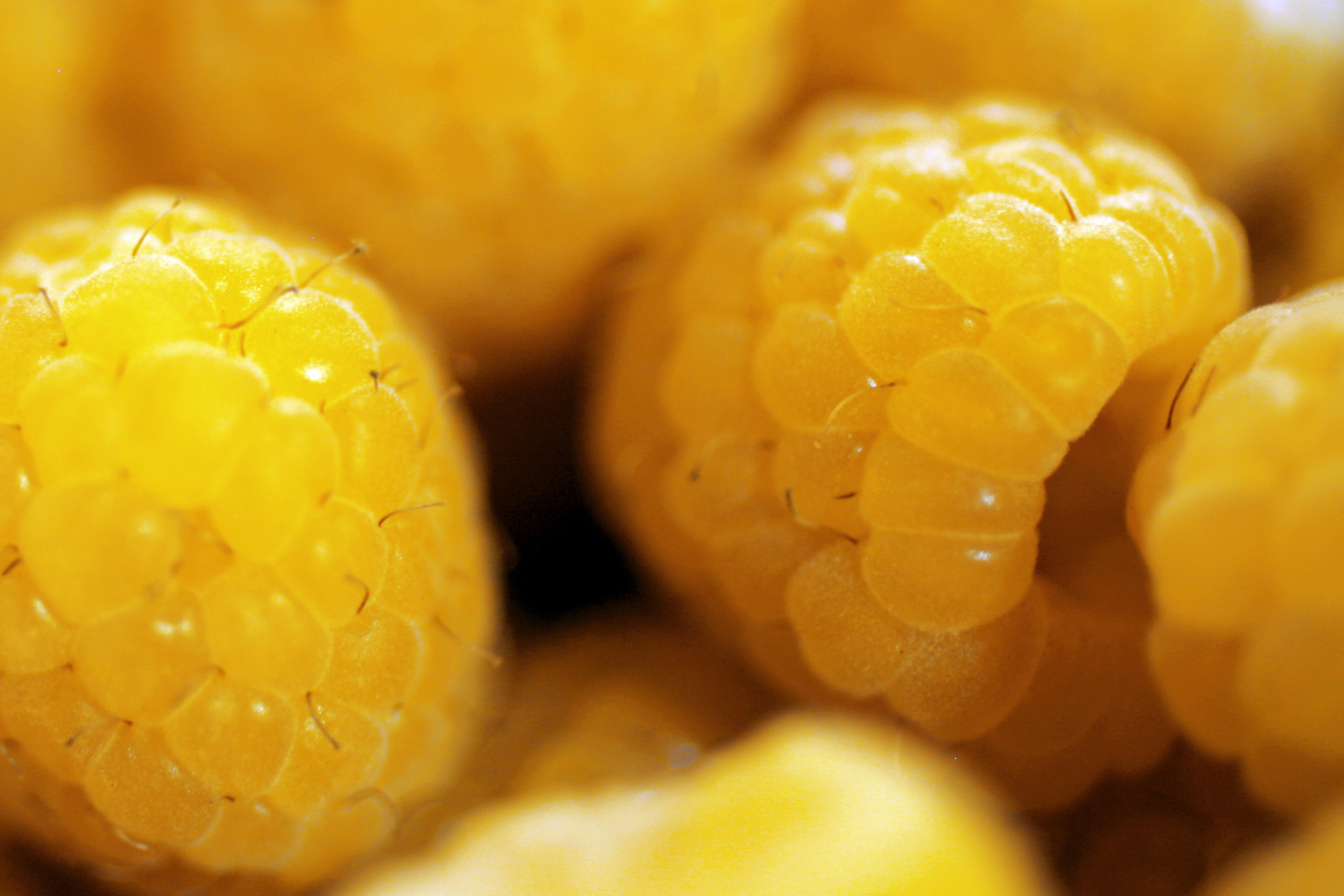 Golden Raspberries Frambuesas amarillas